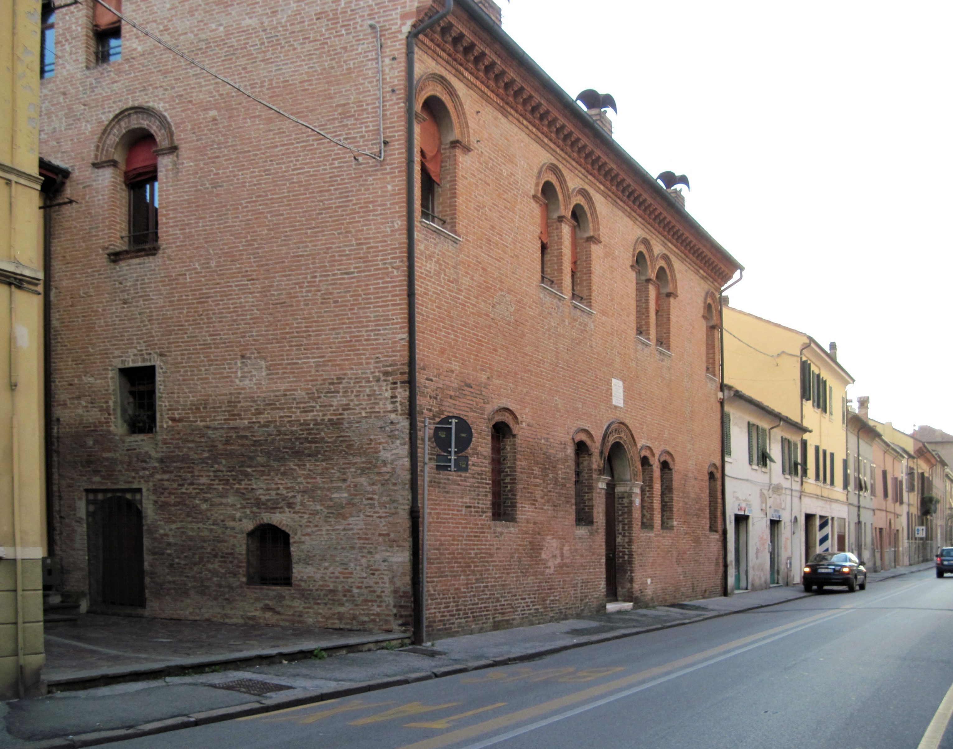 casa di Biagio Rossetti, lato est e facciata principale